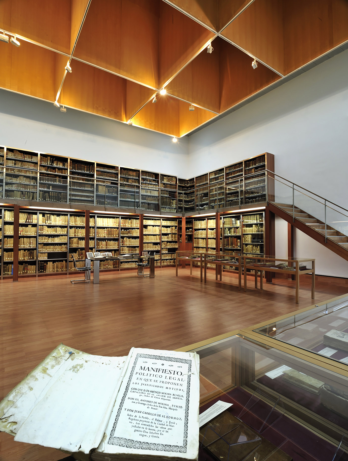 Espinardo, Murcia 2009